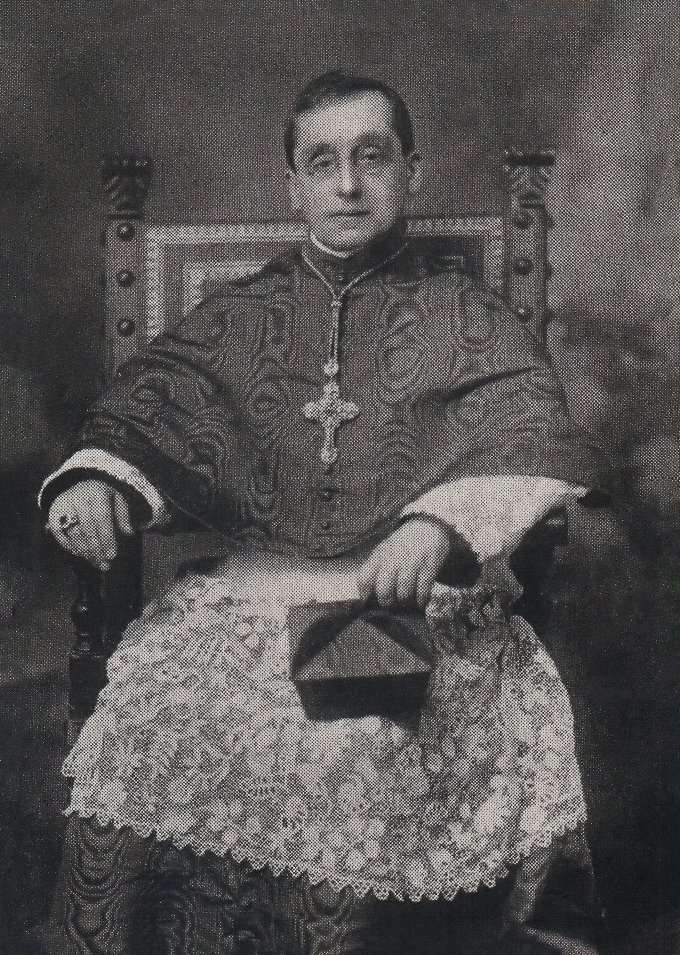 Giacomo Paolo Giovanni Battista della Chiesa (later Pope Benedict XV) as Cardinal